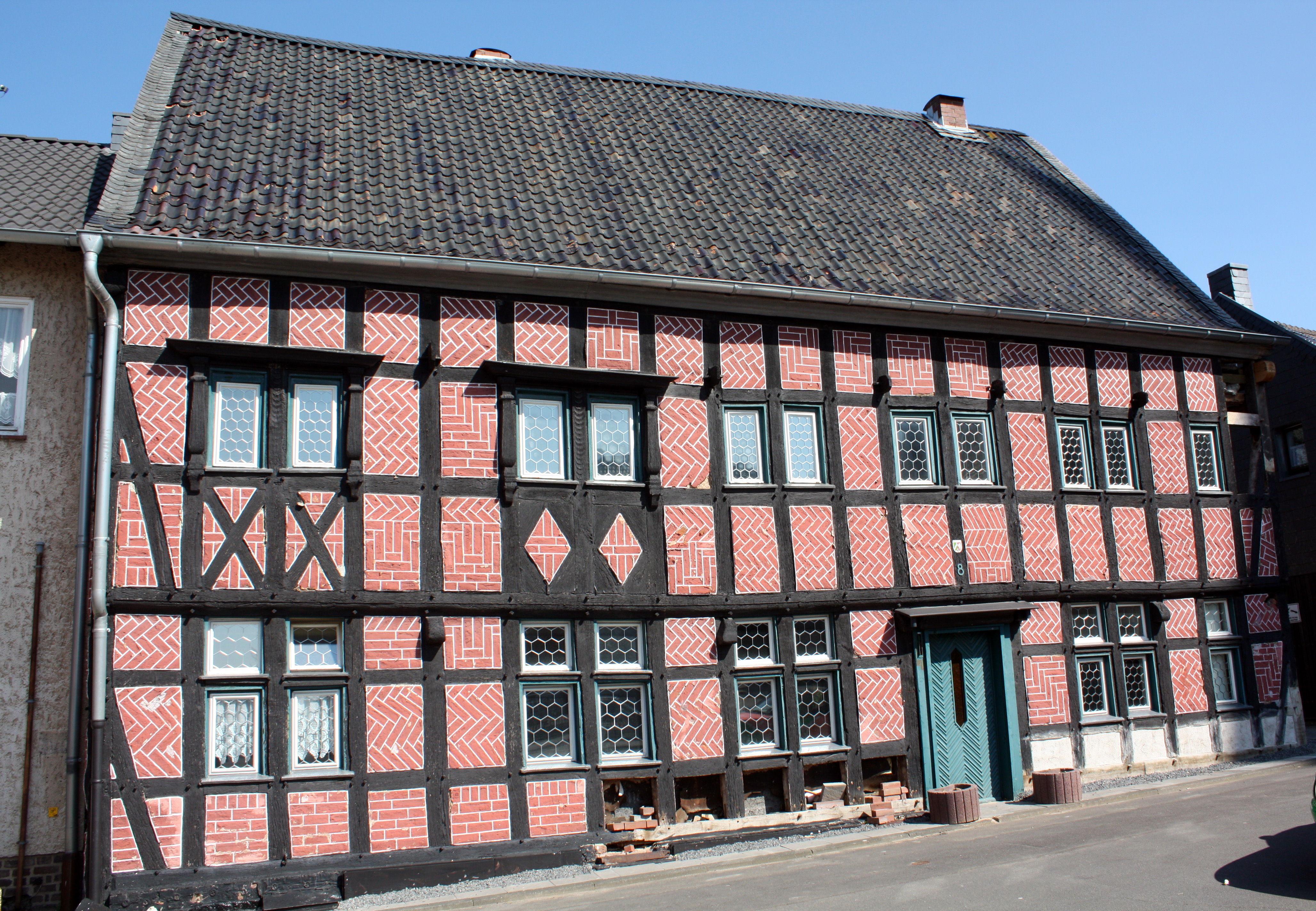 Friesheim, Haus Fuck.Haus Fuck ist nach neueren Untersuchungen 1608 erbaut worden. Die Gefache sind mit Feldbrandsteinen ausgefüllt, die unterschiedliche Muster bilden. Bei einer Renovierung 1953 erhielten die Balken einen konservierenden schwarzen Anstrich. Die Ziegel sind in einem leuchtenden Rot gestrichen worden, deren Fugen mit einem weißen, schützenden Schlämmmaterial versehen wurden. Angaben nach D. Hoffsümmer: Haus Fuck in: F. Bartsch. D. Hoffsümmer, H. Stommel: Denkmäler in Erftstadt. Erftstadt 1998-2000.